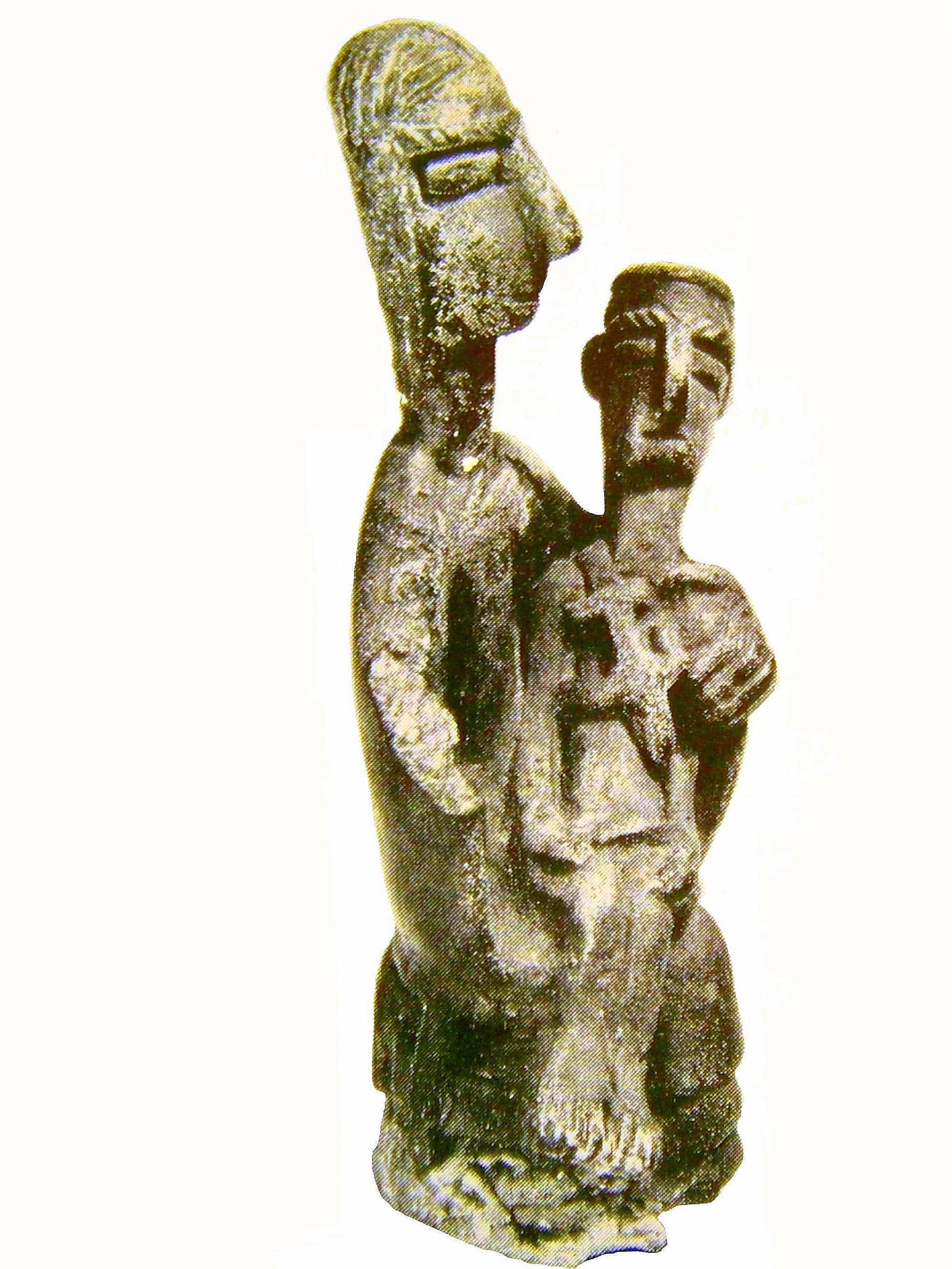 Bronzetto nuragico - La madre dell'ucciso - Urzulei, località Sa Domo 'e s'Orcu. Cagliari, Museo Archeologico Nazionale. Nuragic Pietà from Urzulei (Sardinia). Cagliari, Museo Archeologico Nazionale. Own work By --Shardan 16:45, 14 September 2007 (UTC)